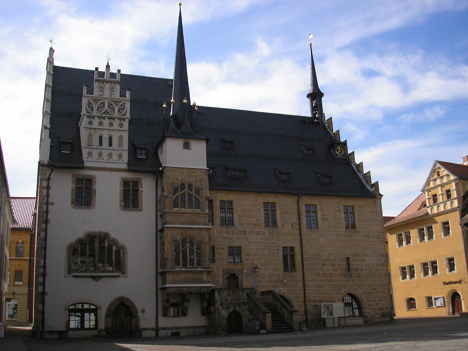 Das Rathaus in Neustadt an der Orla (Thüringen)